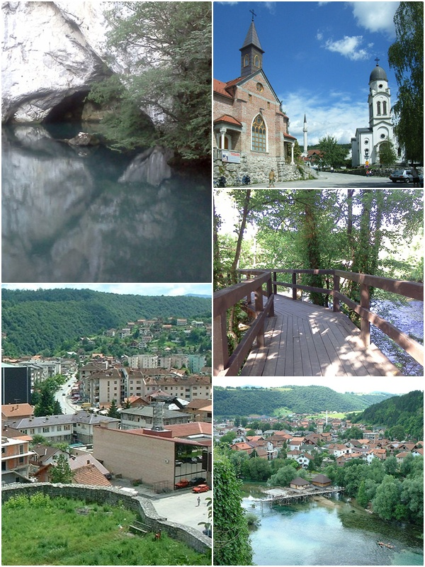 Bosanska Krupa, Bosna i Hercegovina